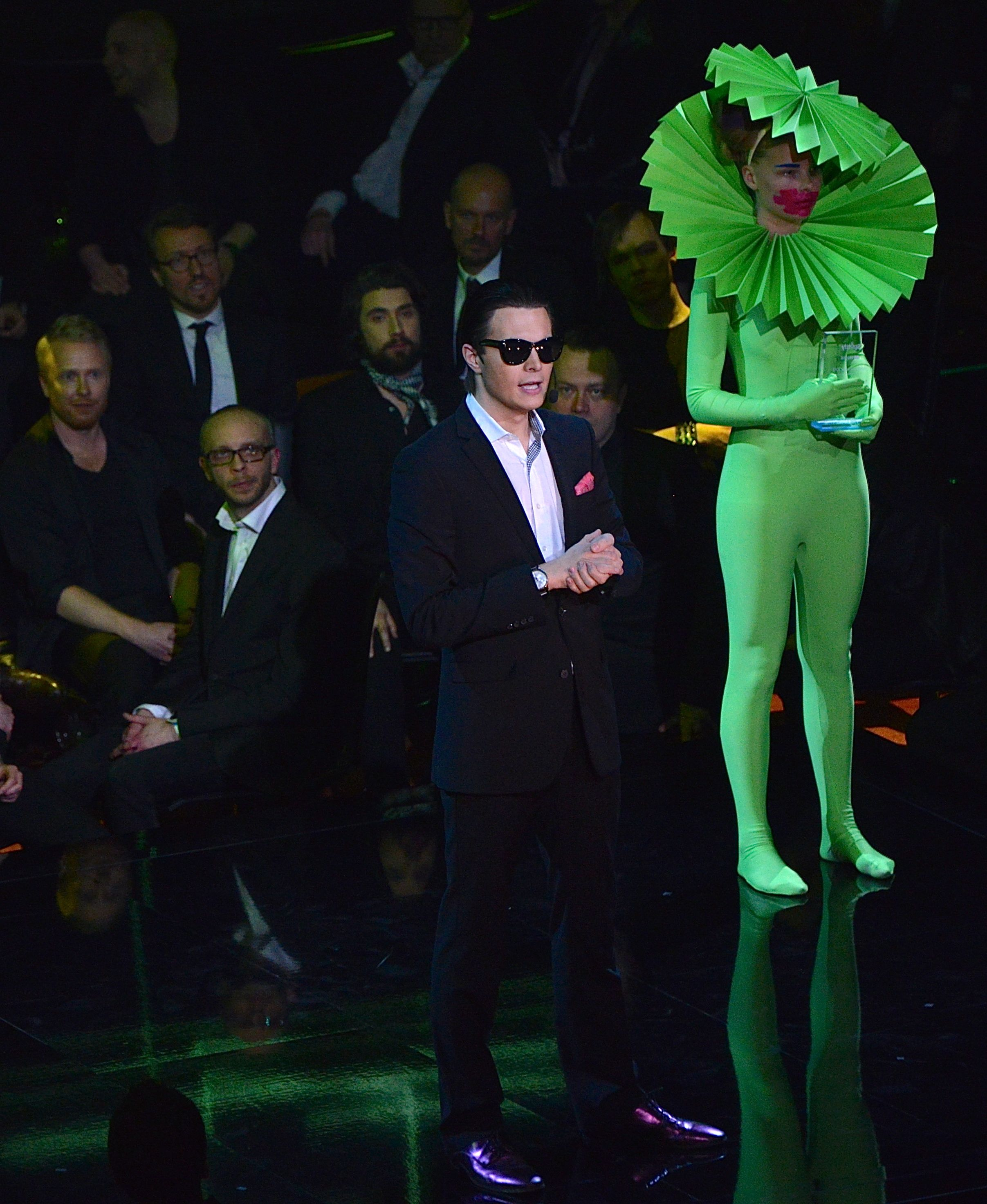 Messiah Hallberg på Grammisgalan på Cirkus, Stockholm den 20 februari 2013.